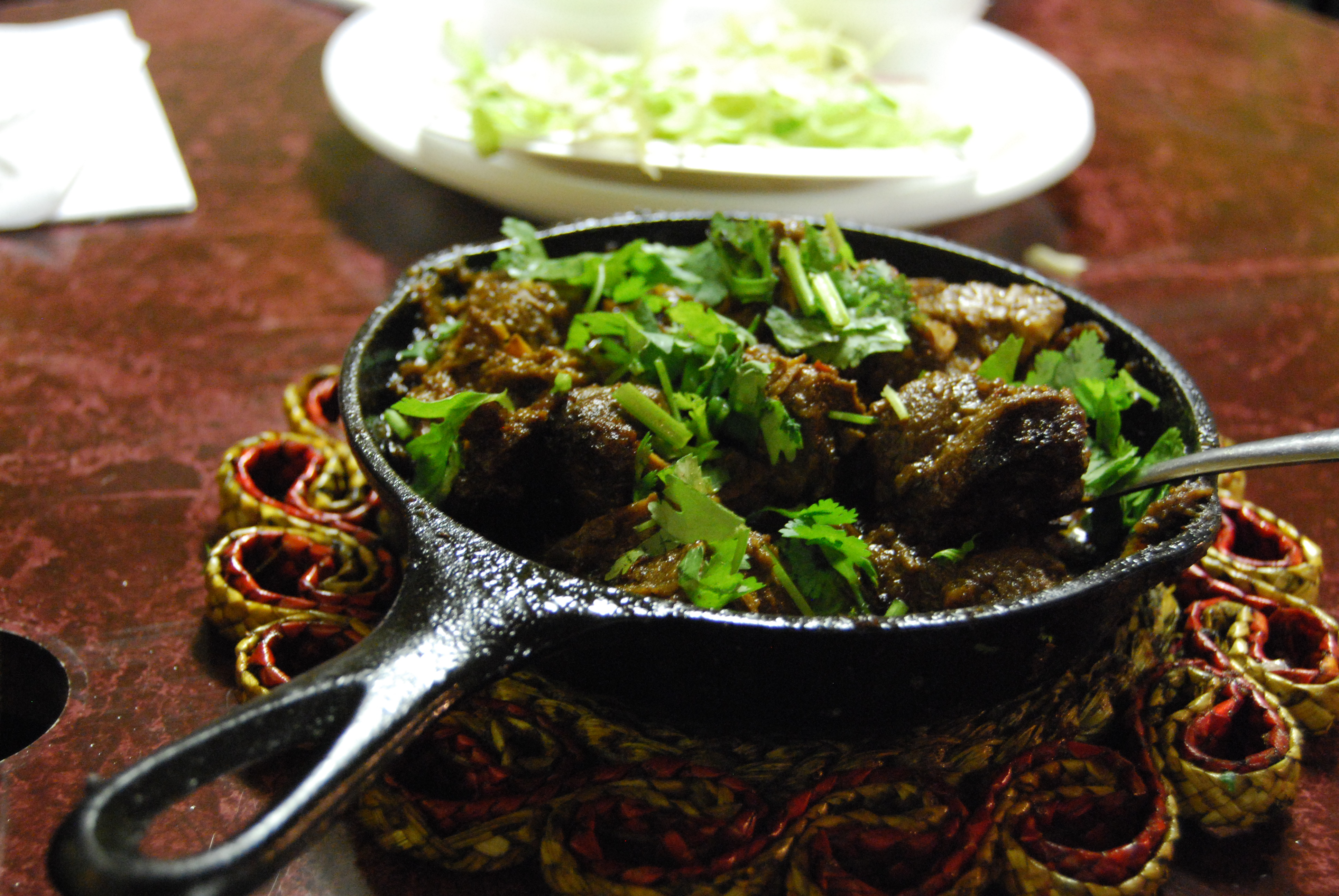 Lahore Tikka House